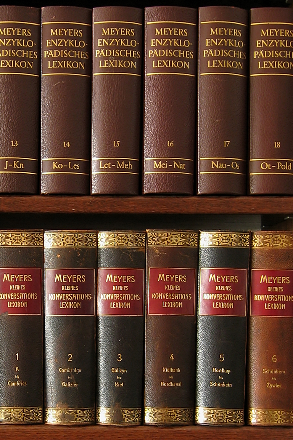 Meyers Konversattions-Lexikon, alt (ab 1908) und neu (ab 1971)